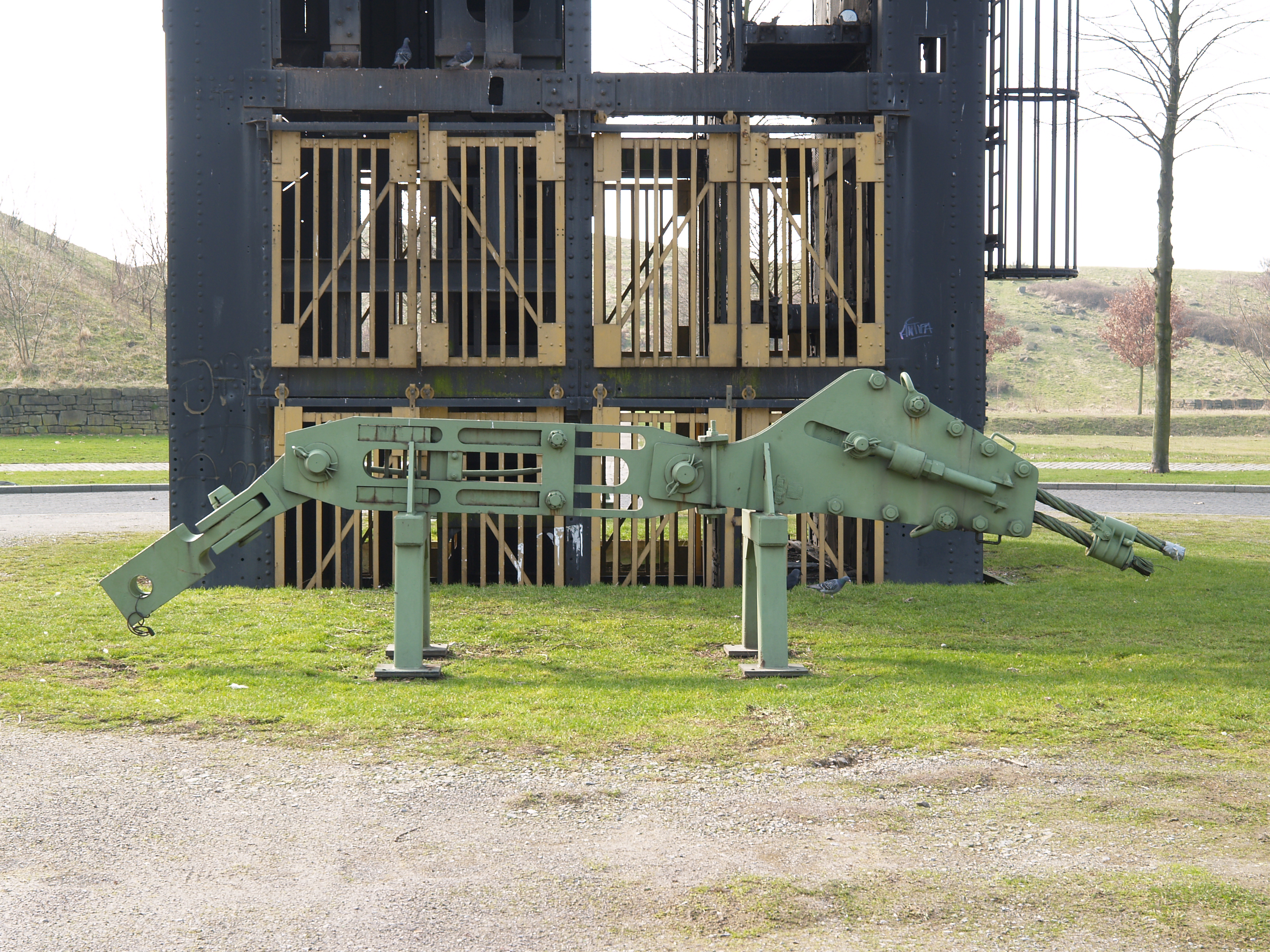 Aufgebocktes Zwischengeschirr, das Element zur Verbindung eines Förderkorbes mit dem Förderseil, vollständige Ansicht, vor dem Förderschacht der ehemaligen Zeche Erin in Castrop Rauxel. Im Betrieb ist die rechte Seite oben.